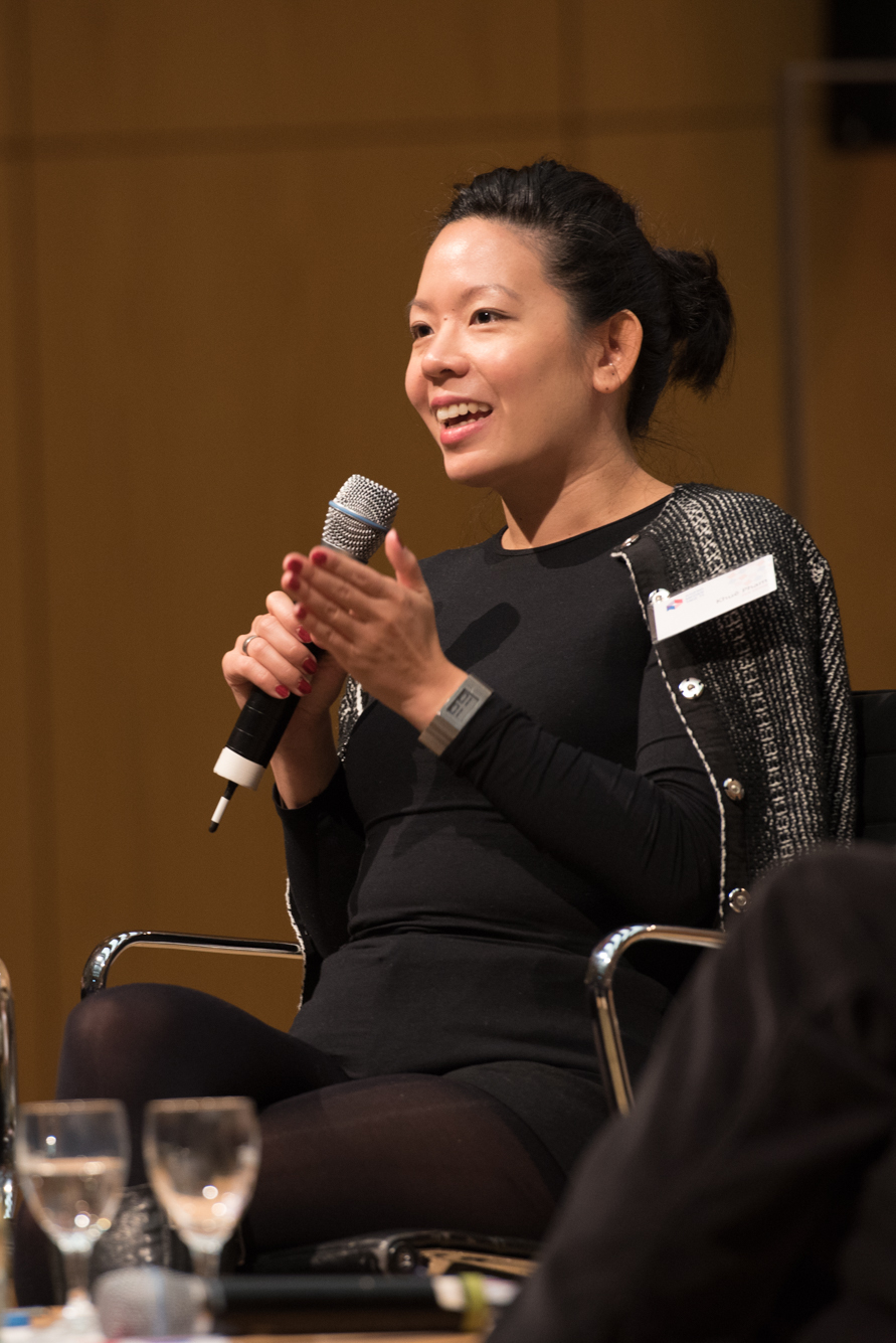 Khuê Pham (Die Zeit) auf dem Podium "Männlich, bürgerlich, weiß – reicht uns diese Perspektive?"